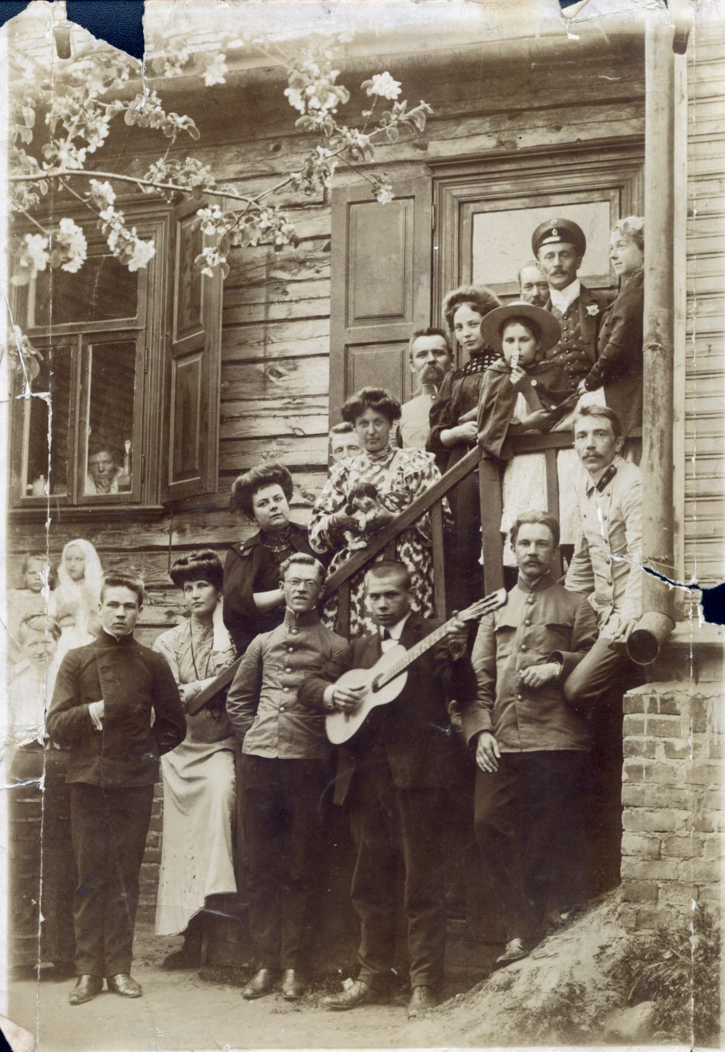 Беларуская (тарашкевіца): Менск (Miensk), Пляшчанка (Plaščanka). Дом У. Дзядзюшкі (Dziadziuška)